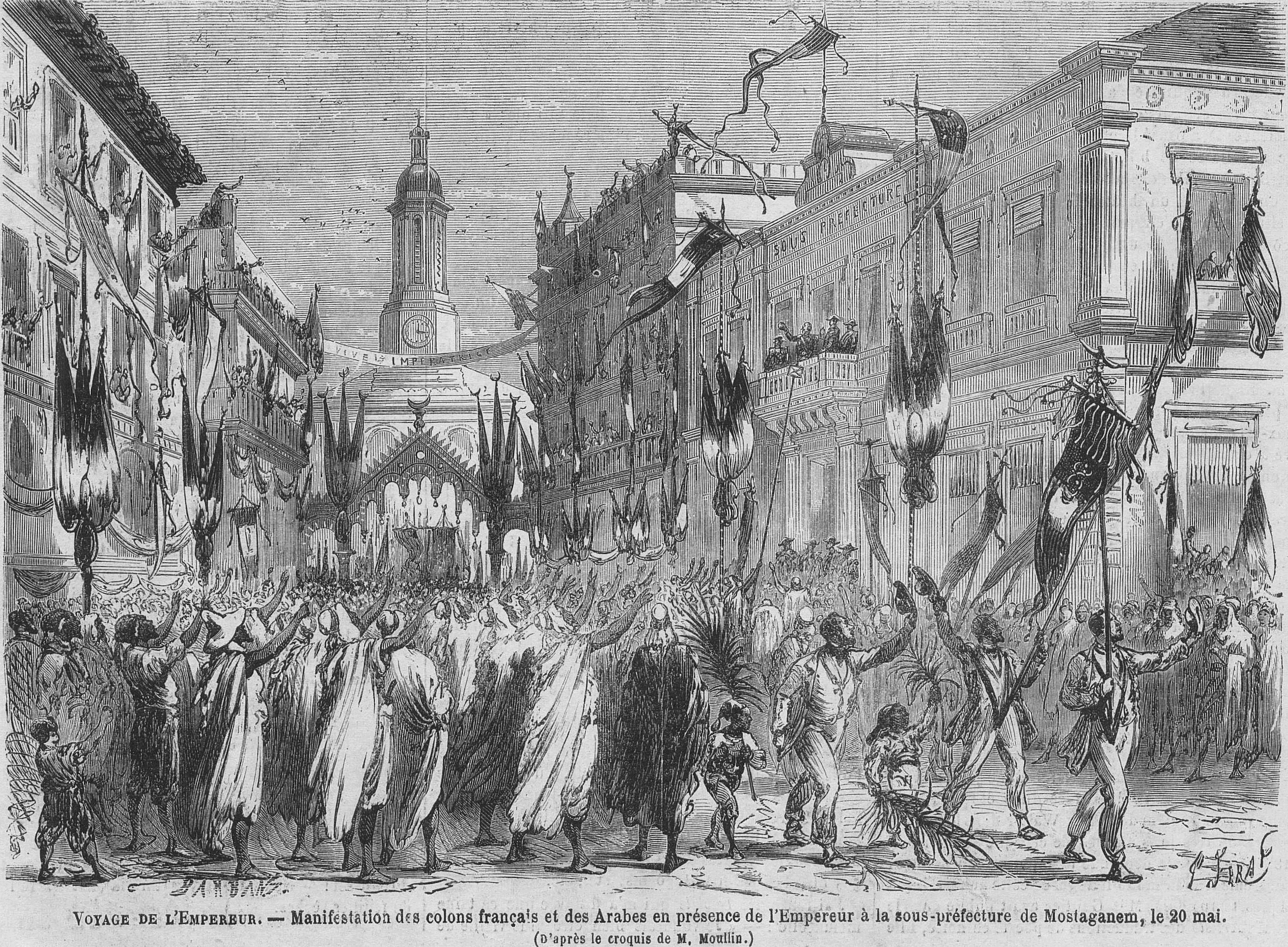 Gravure ancienne extraite du journal Le Monde Illustré, mai 1865. Illustration d'après le croquis de M. Moullin qui représente l'Empereur Napoléon III au balcon de la sous-préfecture de Mostaganem (département d'Oran, Algérie) saluant les colons français et les Arabes lors de sa visite officielle le 20 mai 1865. Extrait de l'article "VOYAGE DE S.M. L'EMPEREUR EN ALGERIE". L'article publié page 340 comprend le commentaire suivant: "Excursion à Médéah. De Blidah à Médéah, la route n'est bordée de loin en loin que par des habitations isolées, mais toutes ces maisons étaient décorées de drapeaux, et les habitants, dans la mesure de leurs moyens, s'étaient attachés à les orner de guirlandes de verdure, de couronnes et de fleurs, autour desquelles tout le monde, hommes, femmes, enfants, venait se grouper au moment du passage de l'Empereur. Ces modestes et naïves manifestations de la reconnaissance des populations empruntaient à leur rusticité même un caractère des plus touchants."